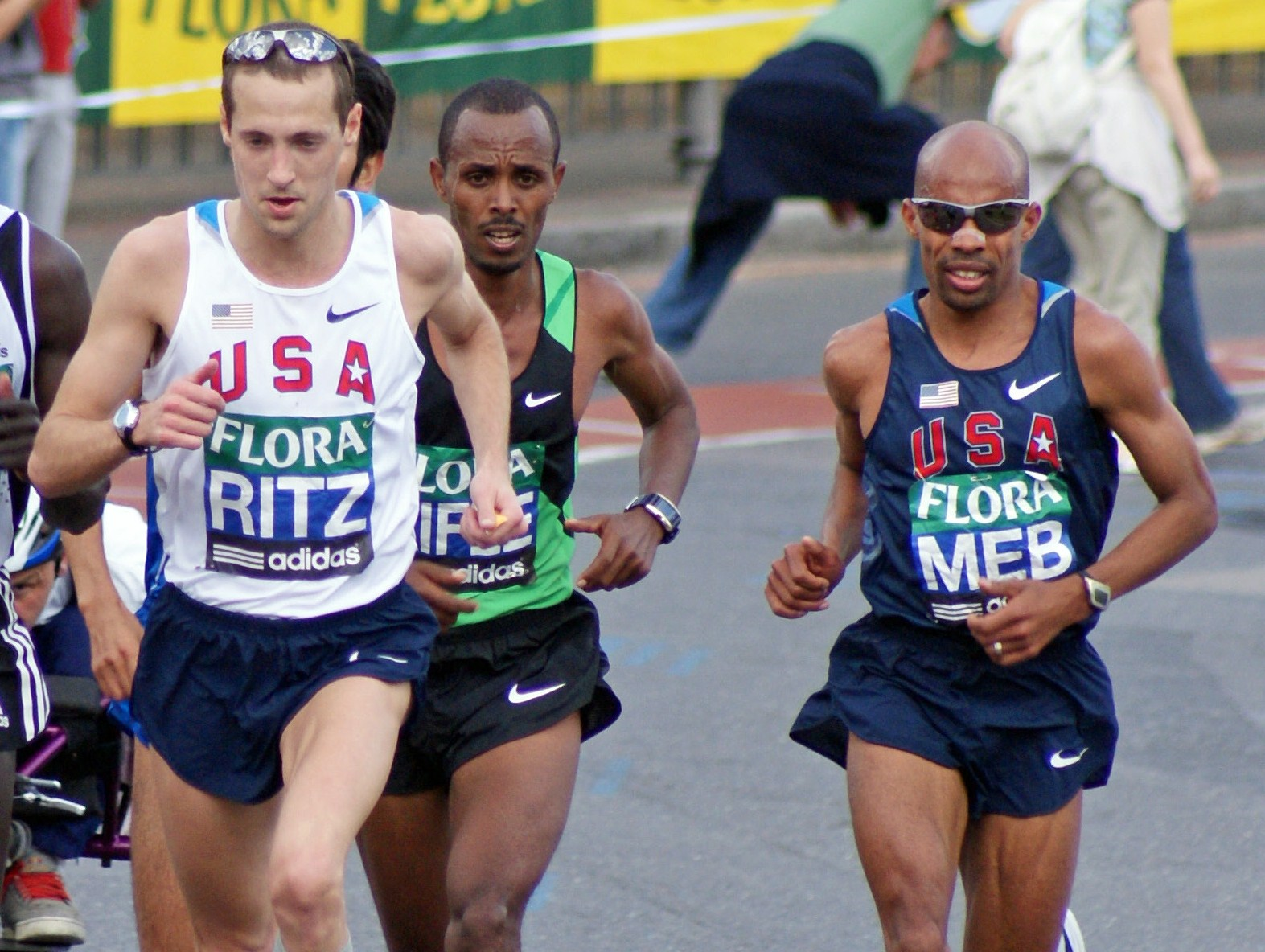 Dathan Ritzenhein, Yonas Kifle (behind Ritzenhein), and Meb Keflezighi at the 2009 London Marathon.